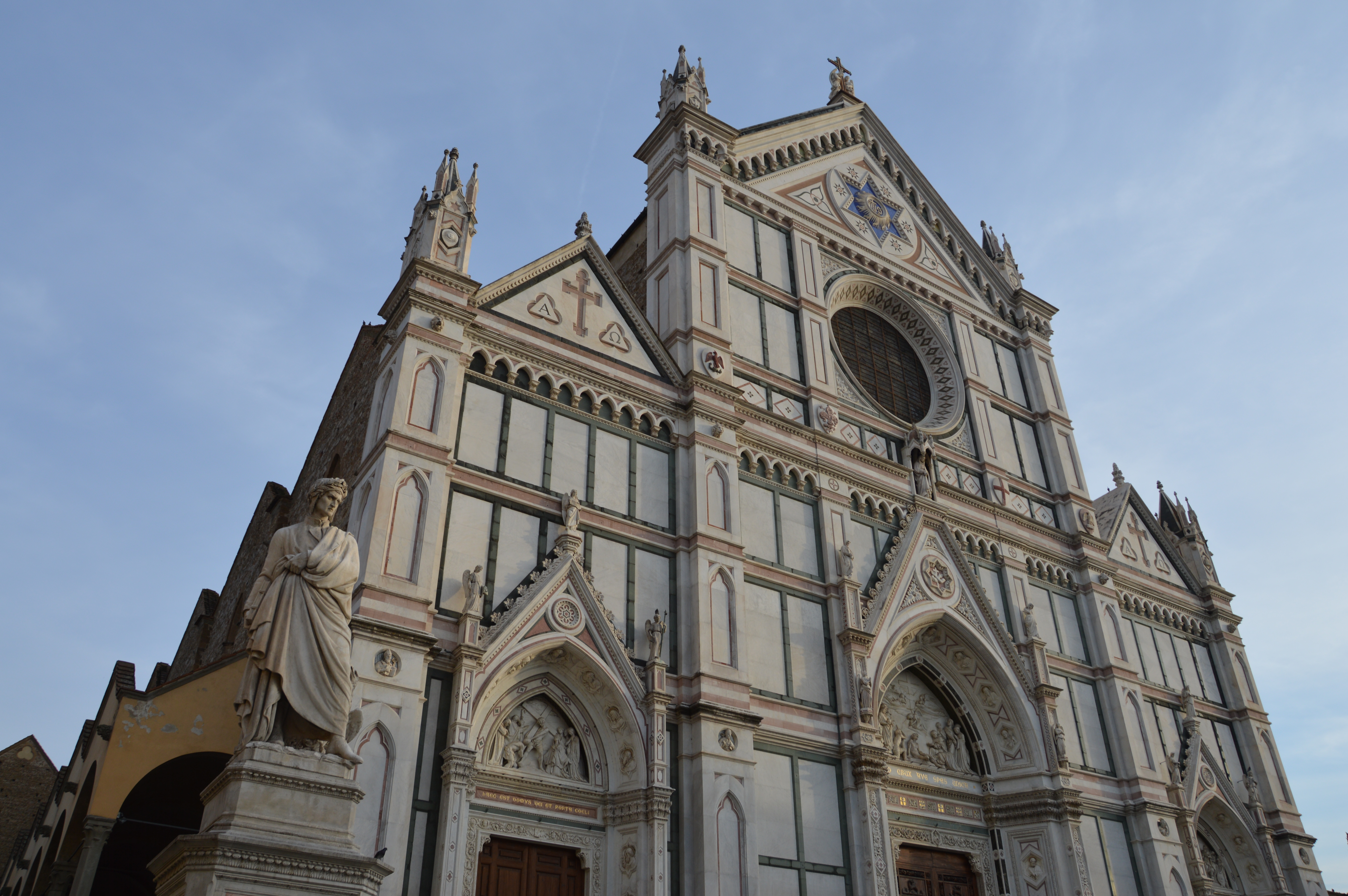 Santa Croce facciata